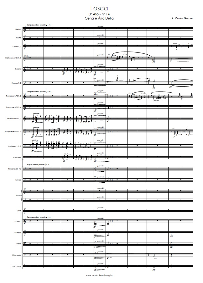 Português do Brasil: Ato 3 da ópera Fosca de Antonio Carlos Gomes